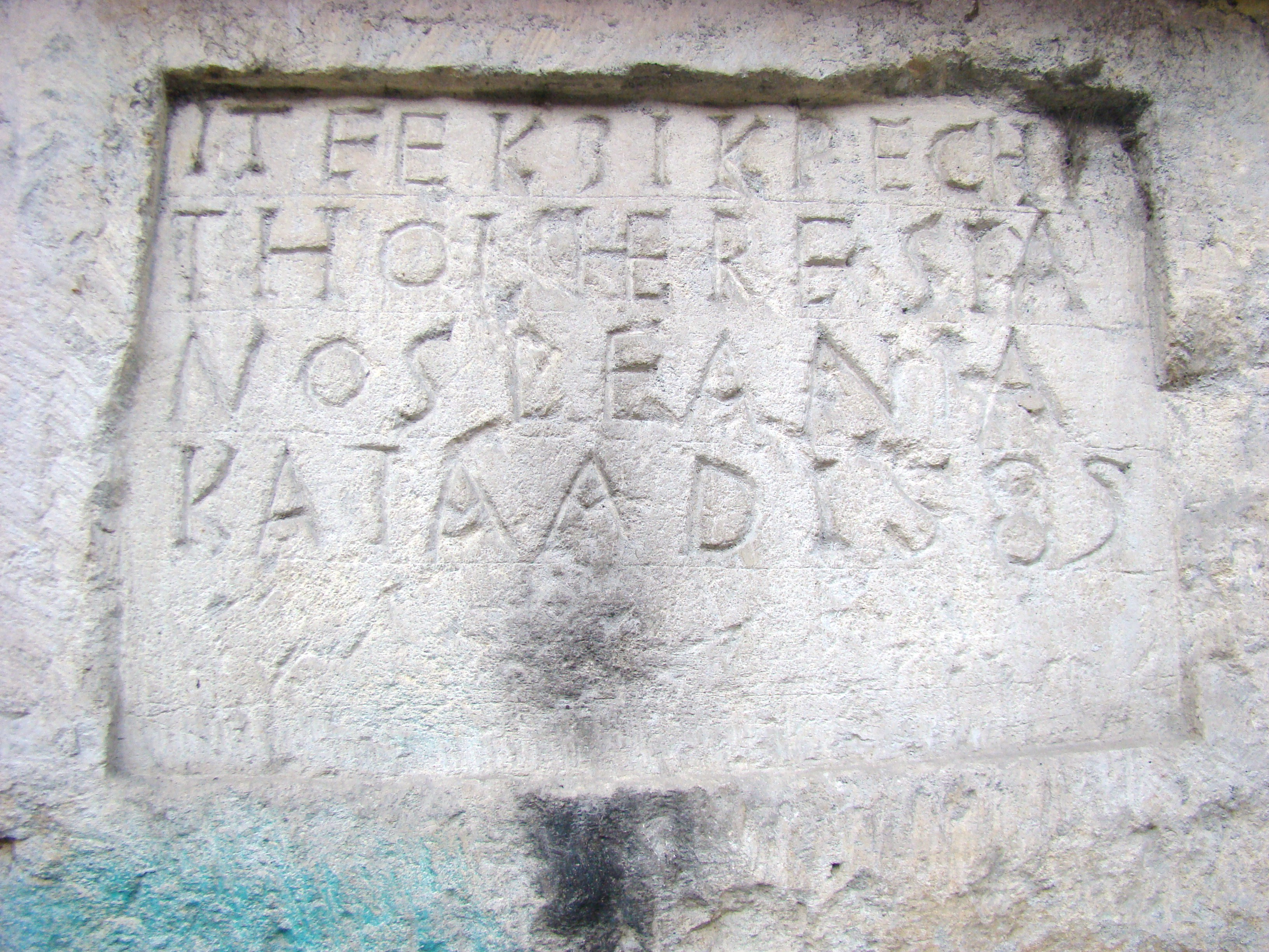 Fragment din zidul celei de-a doua incinte a orașului medieval 06